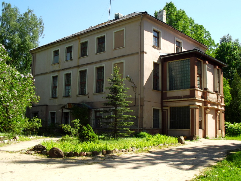 Rindzeles muiža